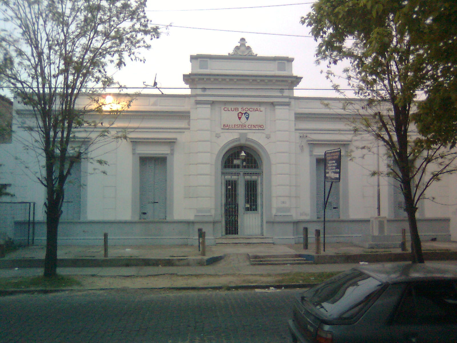 Antigua casona en Villa Ballester, al norte del Gran Buenos Aires, sede actual del Club Social y Deportivo Ballester Centro.